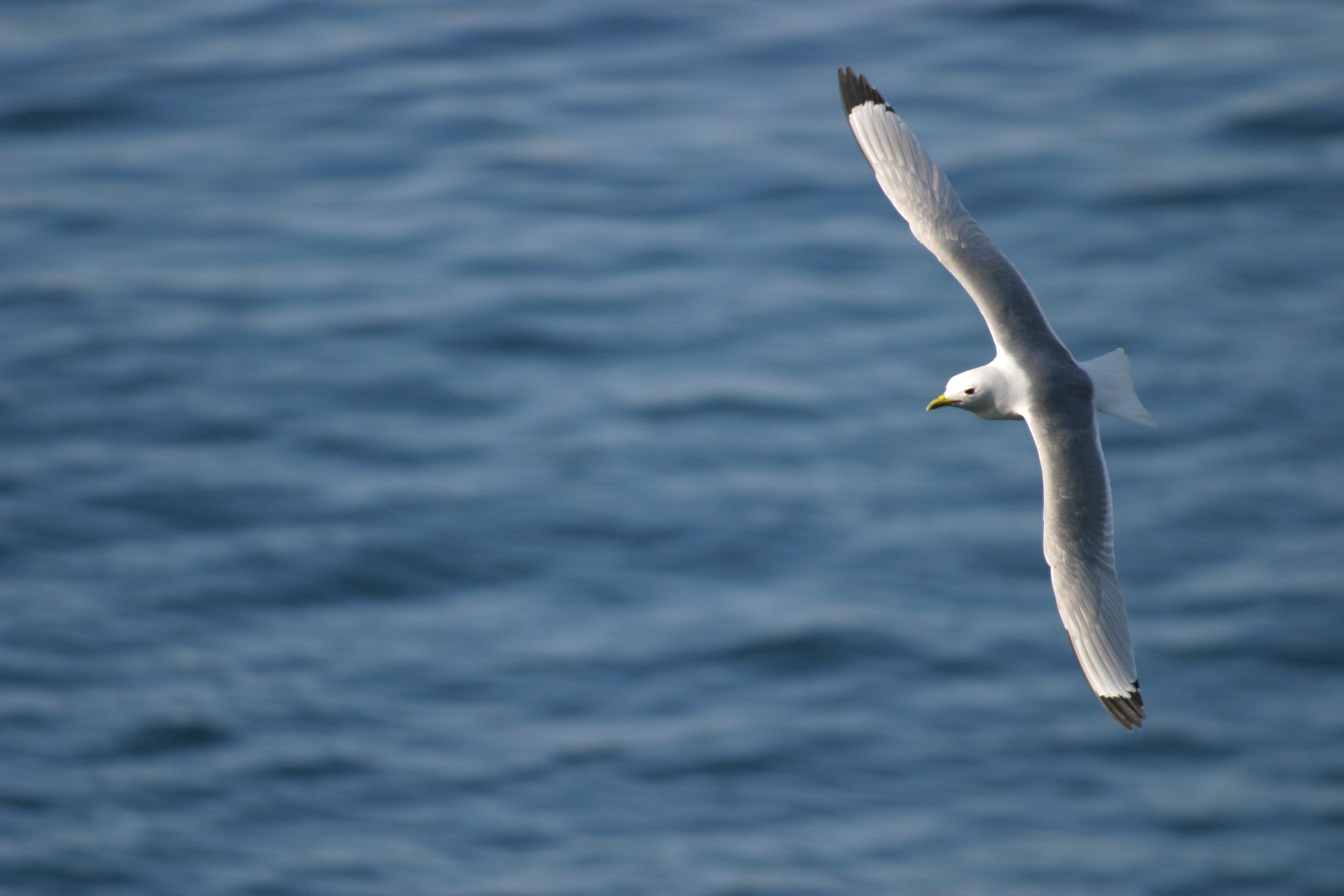 Rissa tridactyla